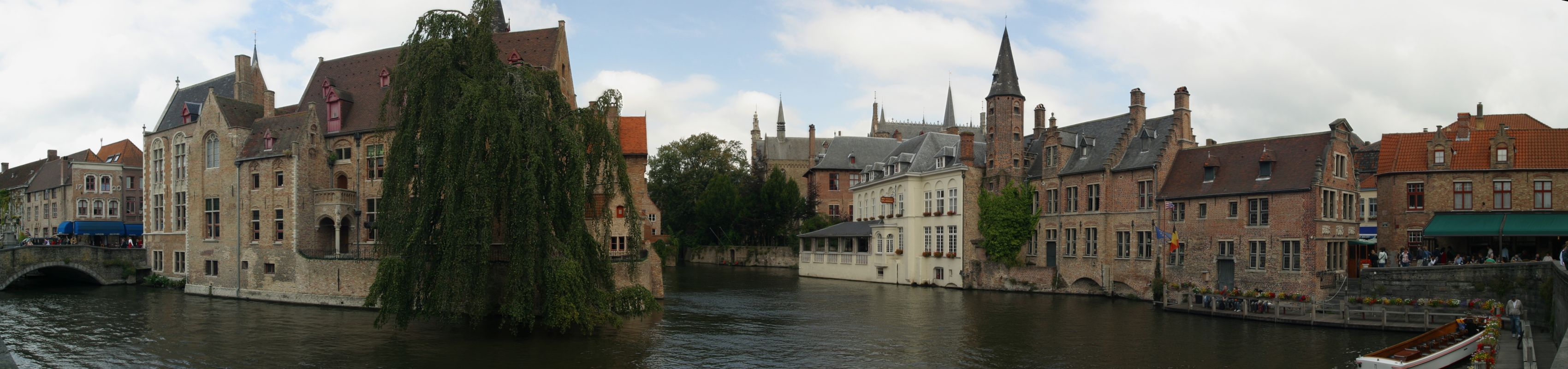 Bruges